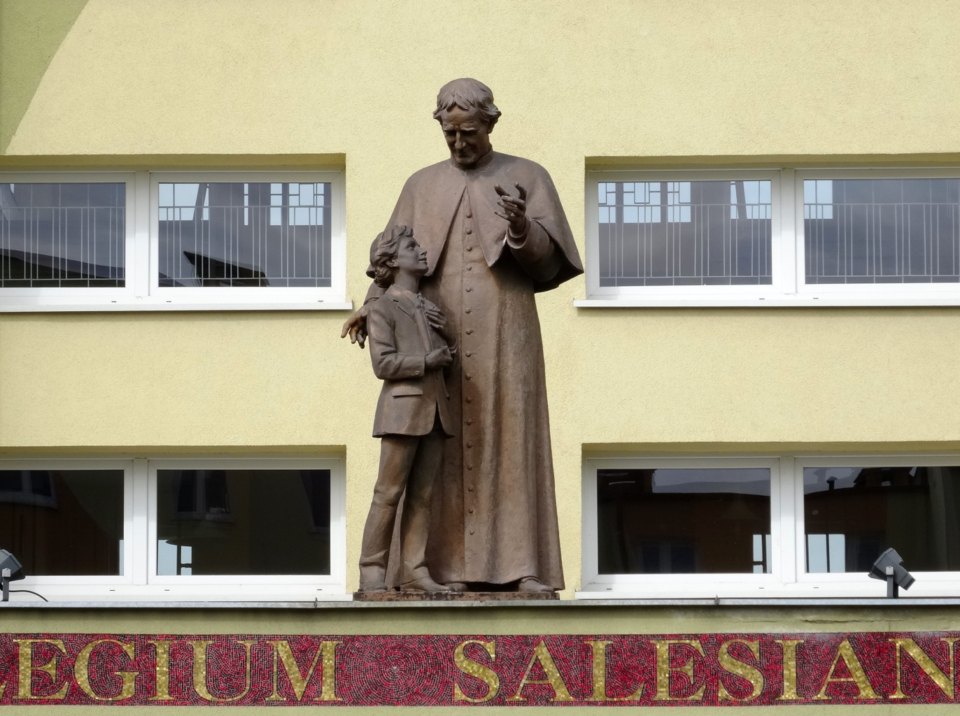 Collegium Salesianum (zespół szkół katolickich Towarzystwa Salezjańskiego) w Bydgoszczy, ul. Pod Reglami 1, os. Tatrzańskie w Fordonie